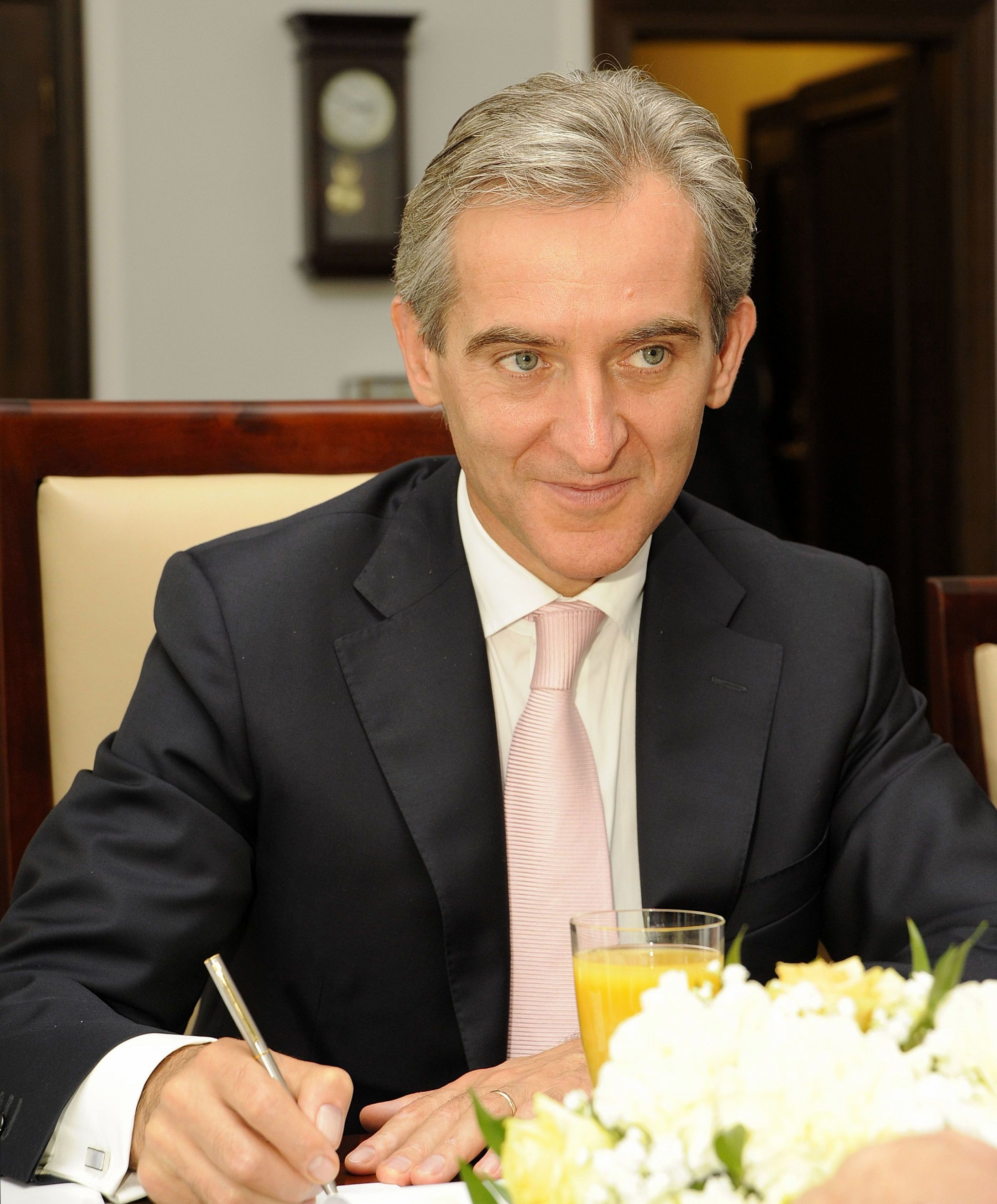 Premier Mołdowy Iurie Leancă w Senacie RP